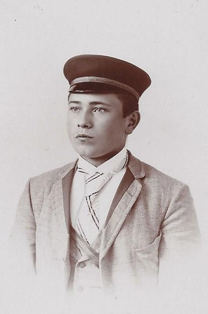 Porträtfotografie von Narziß Ach. Widmung auf der Rückseite: „N. Ach s/l. H. Brucker W.S. 1892/93.“